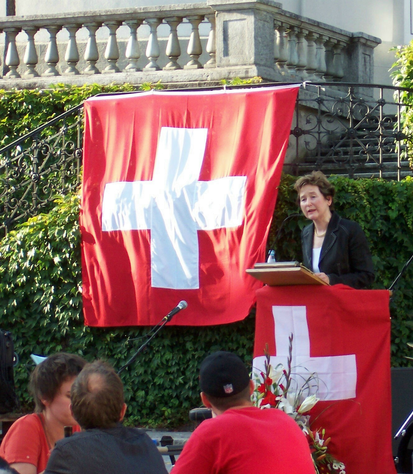 1.August-Rede von Elisabeth Kopp, Schwyz (SZ), 2007